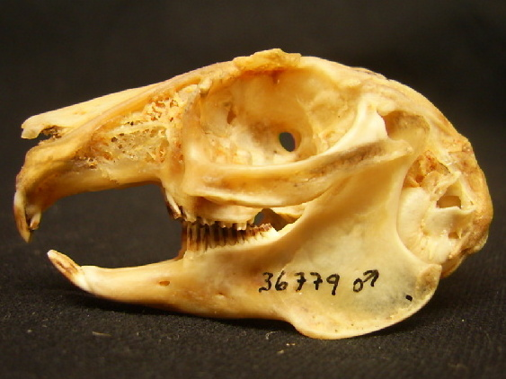 Череп Sylvilagus mansuetus